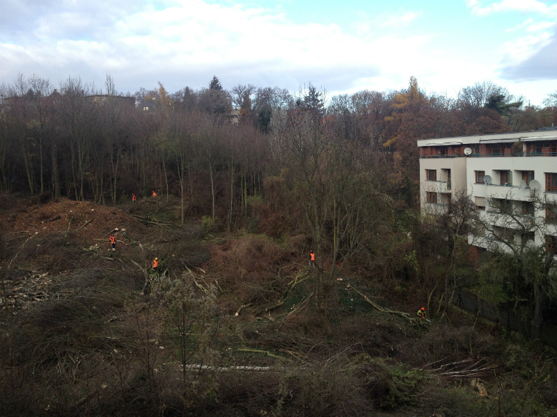 likvidace pražské zeleně pro projekt developera Central Group